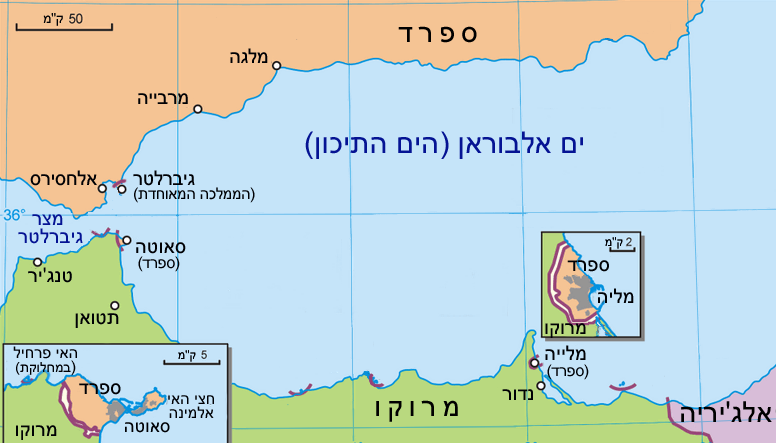 Image:Mapa_del_sur_de_España_neutral.png modified.